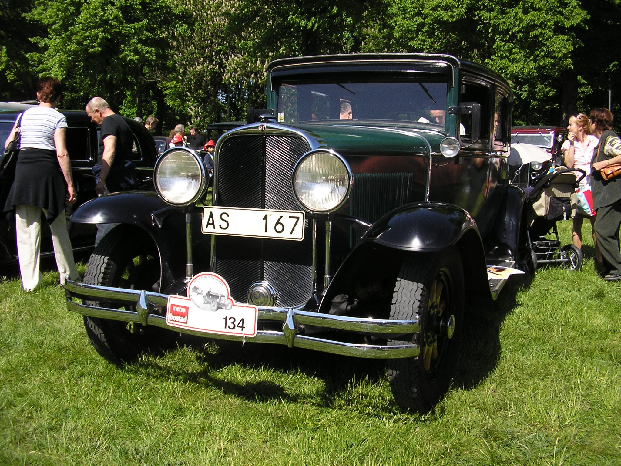 1930 Buick Marquette Model 37 4-door sedan